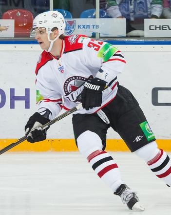 Защитник донецкого «Донбасса» Антон Бабчук во время матча чемпионата КХЛ против московского «Динамо» 31 октября 2012 года.